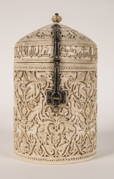 Bote de Zamora (Califato Omeya de Córdoba). Número de inventario: 52113.